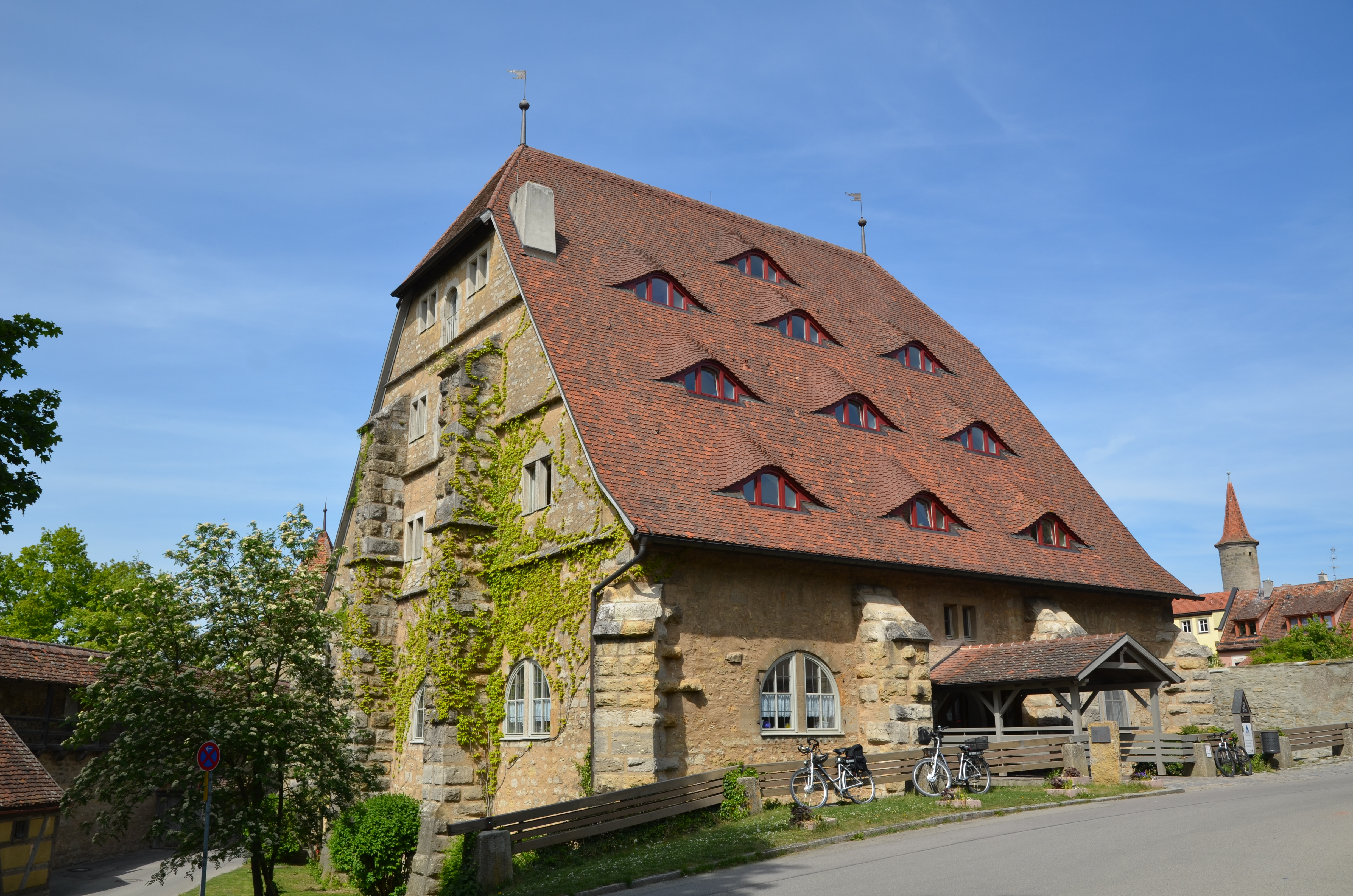 Rothenburg ob der Tauber, Mühlacker 1 Roßmühle